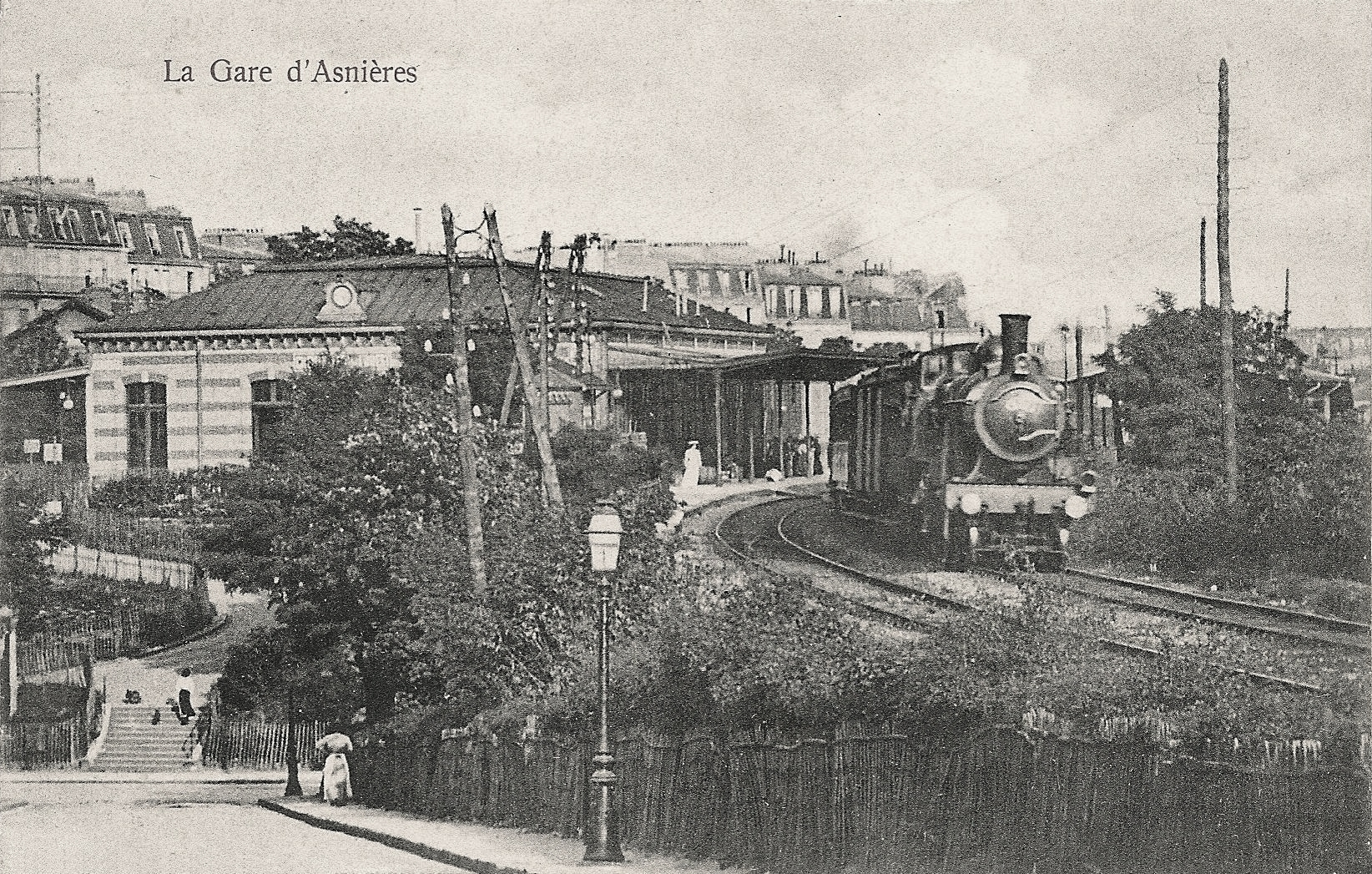 Carte postale ancienne éditée par Trianon n°944, d'un train quittant la gare d'Asnières-sur-Seine en direction de Bécon-les-Bruyères.